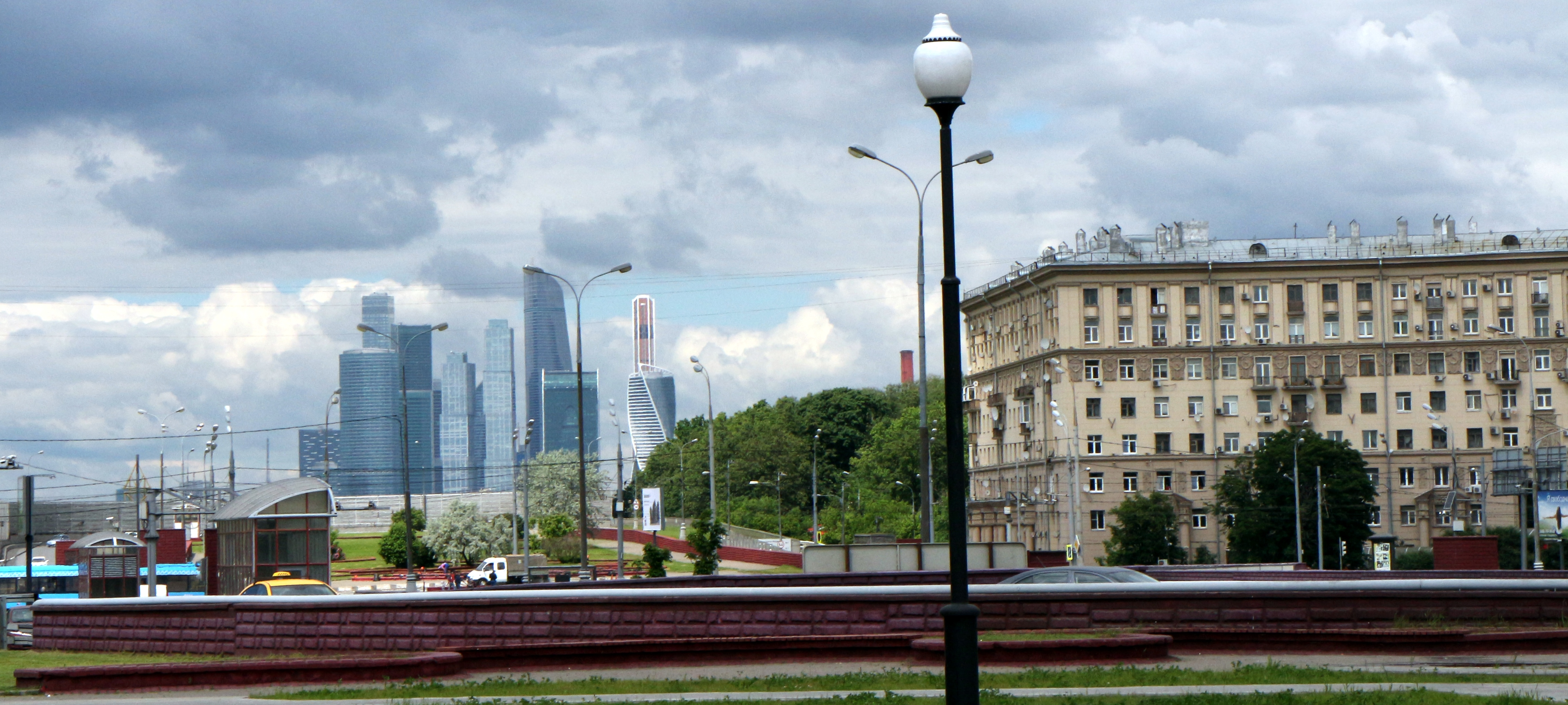 Площадь Гагарина (Москва) - 2017г.